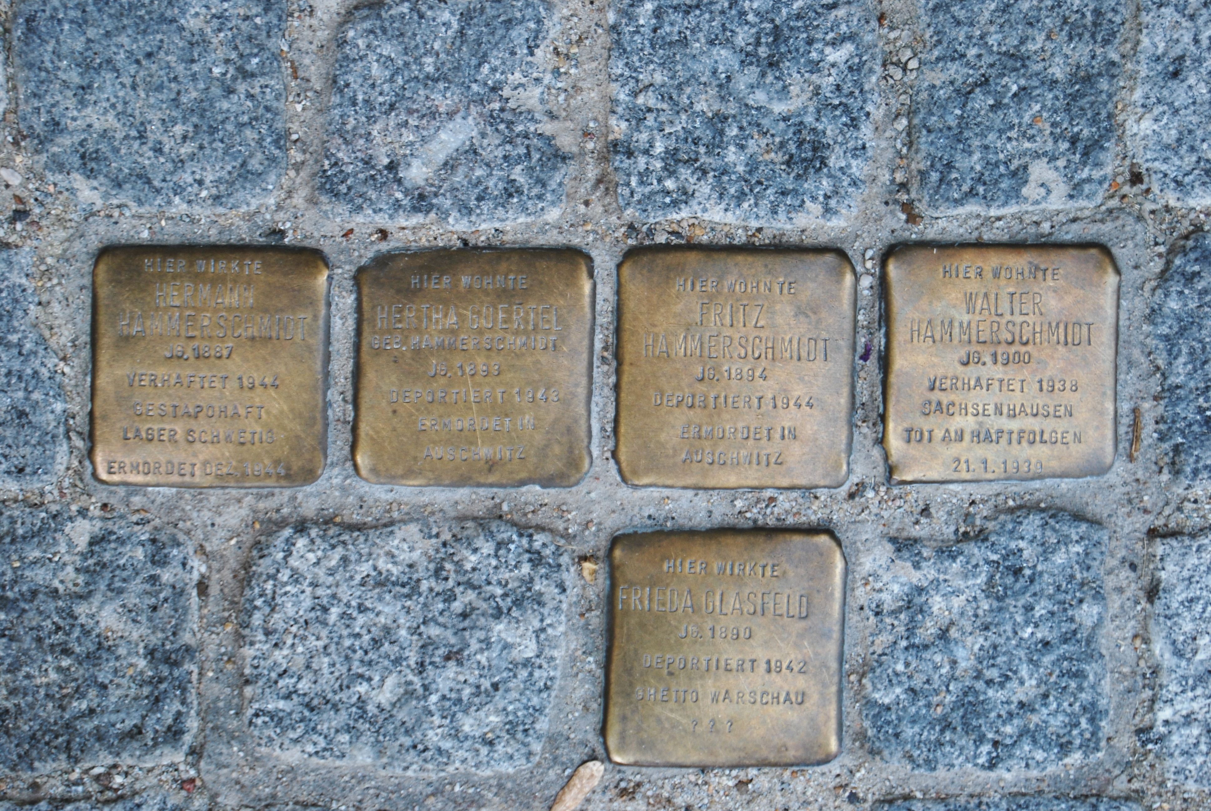 Stolperstein